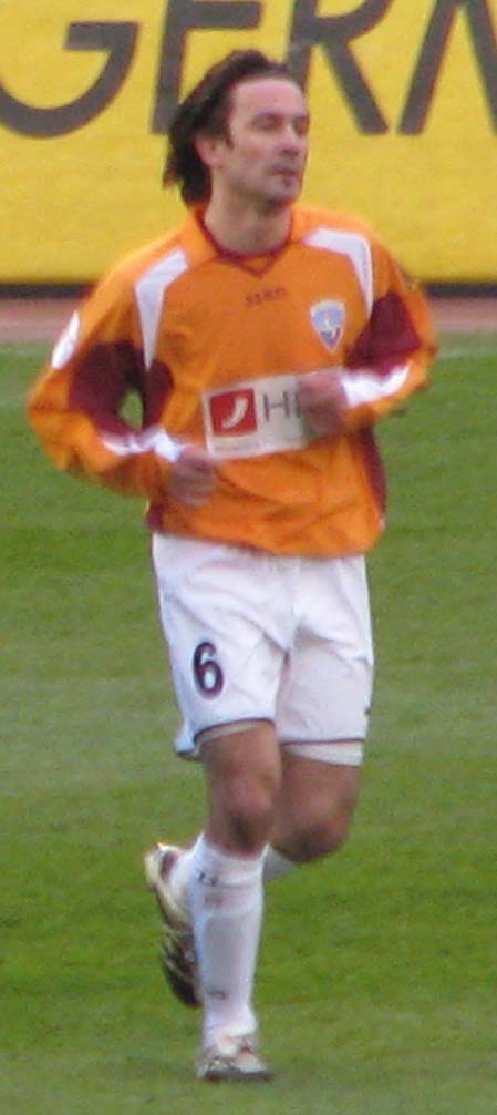 Zoran Roglić